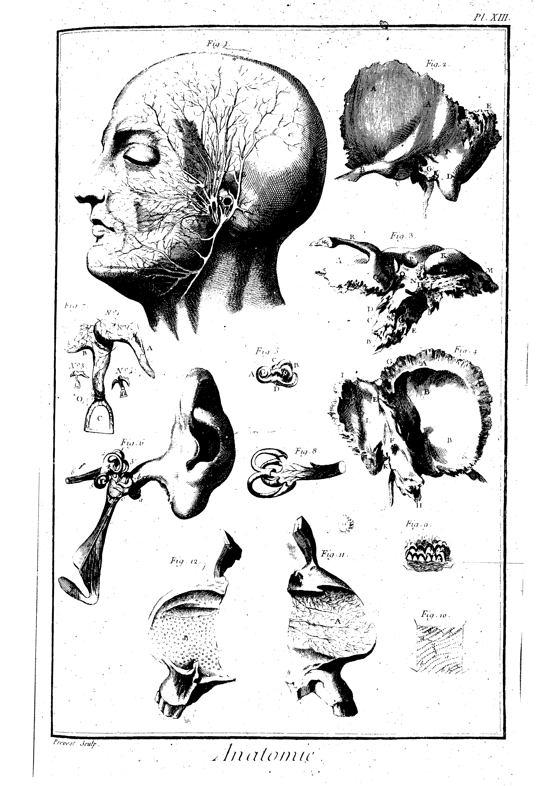 Planches de l'Encyclopédie de Diderot et d'Alembert, volume 1